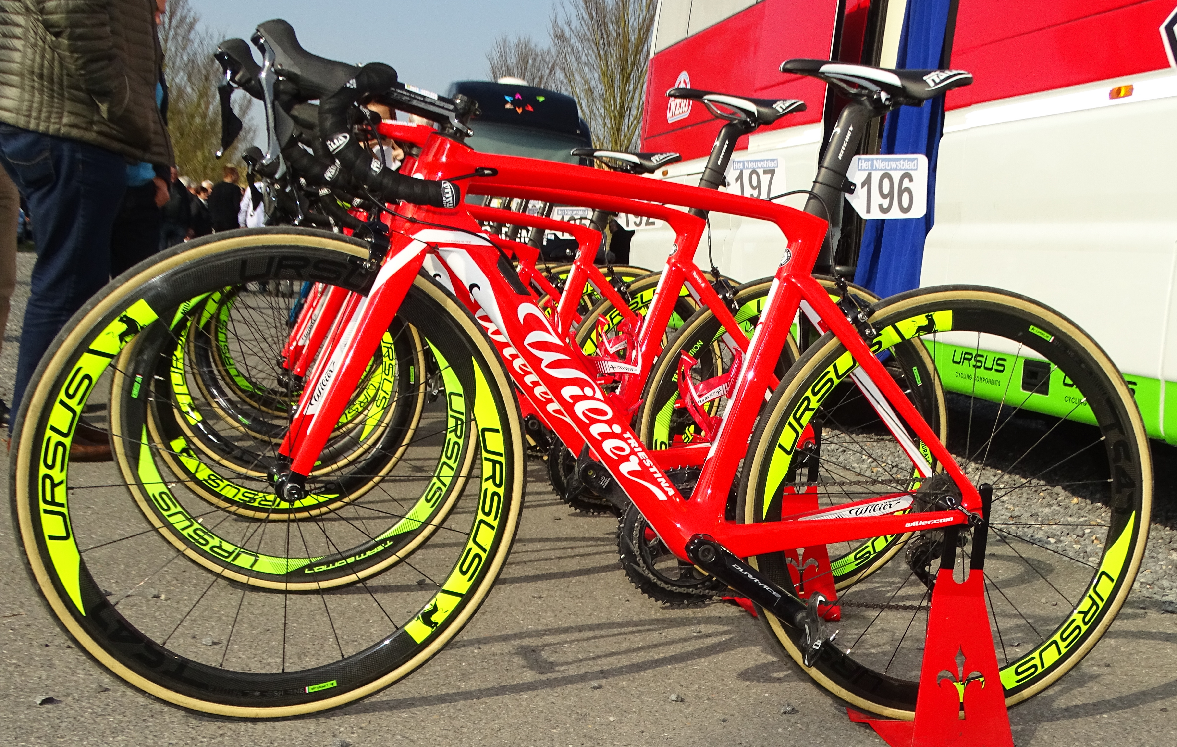 Reportage réalisé le mardi 28 mars à l'occasion de du départ de la première étape des Trois jours de La Panne 2017 à Adinkerque (La Panne), Belgique.